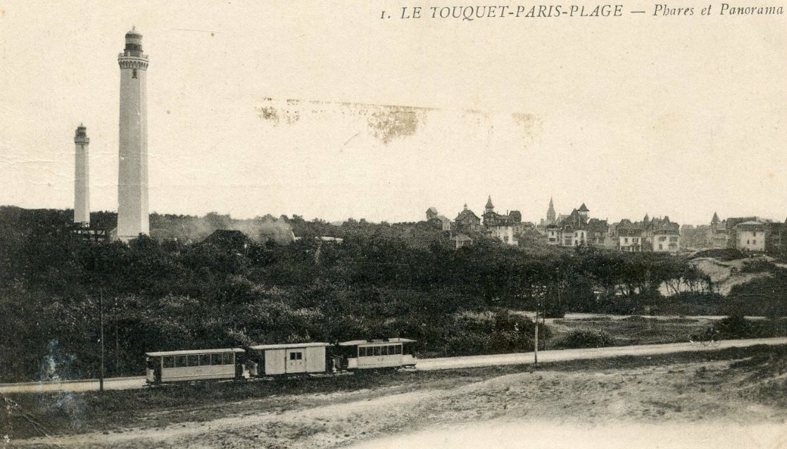 Le Touquet-Paris-Plage - CP - Les phares et le panorama